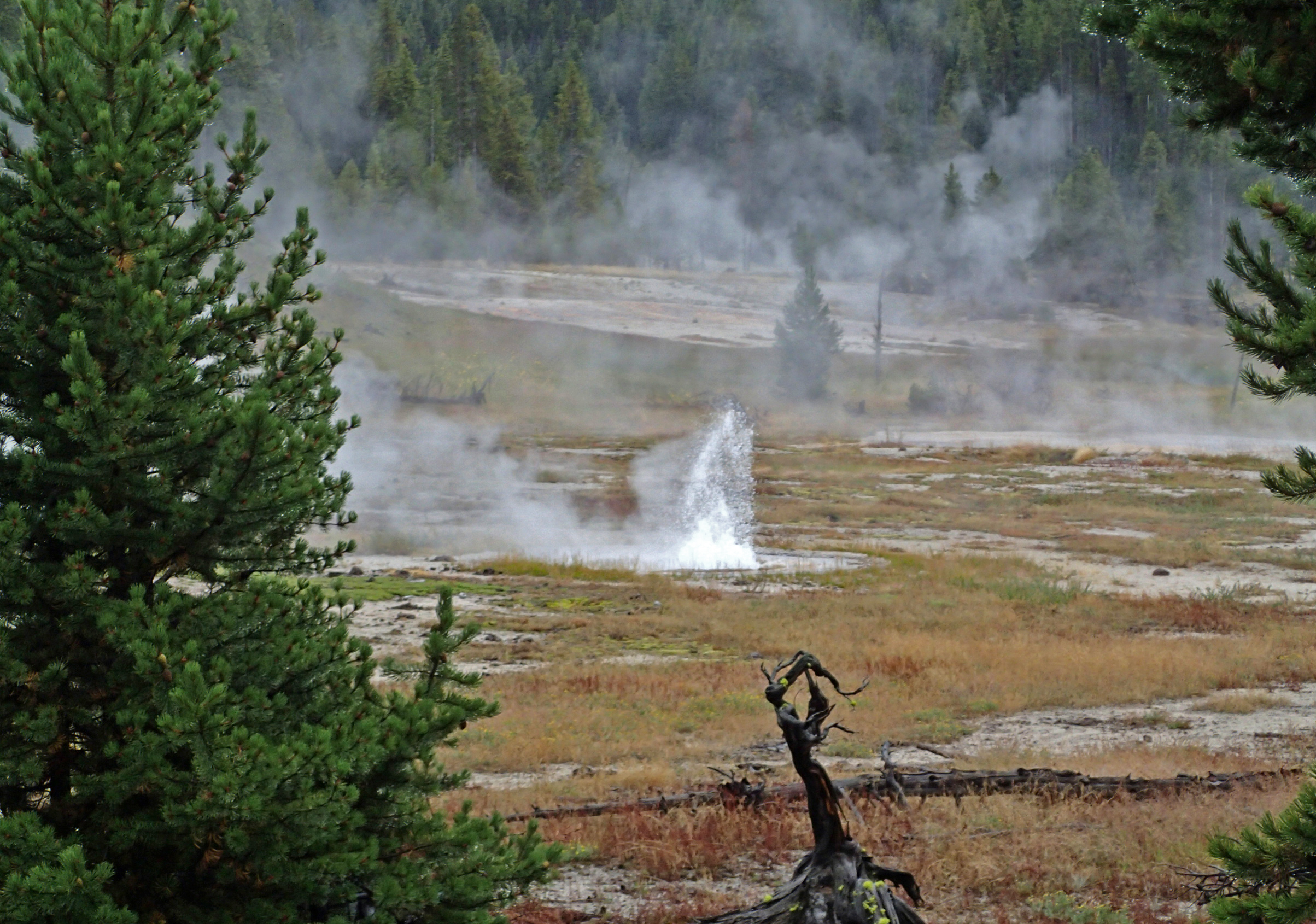 A-0 Geyser eruption (11:13-11:14 AM, 8 August 2015) 2